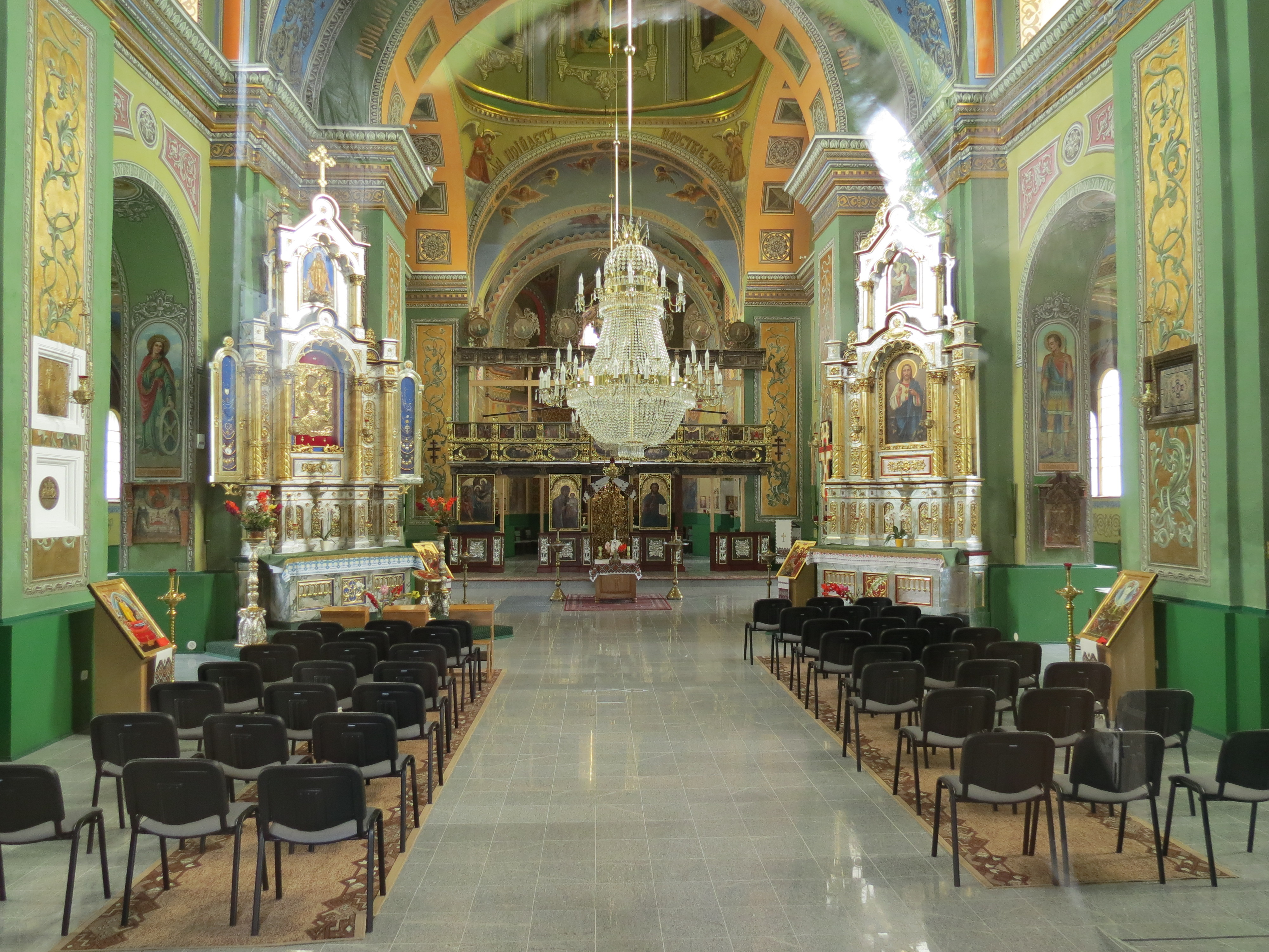 Jarosław, cerkiew gr.-kat. p.w. Przemienienia Pańskiego, ob. kościół rzym.-kat., 1724-1746, 1910